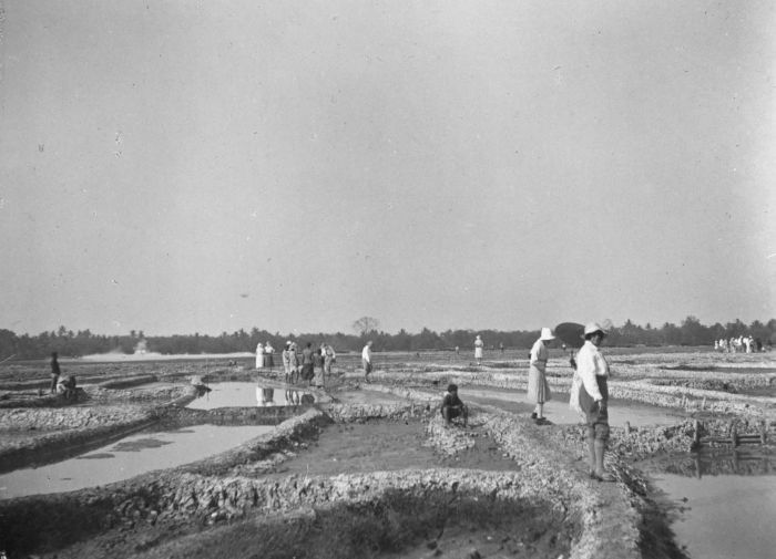 Foto. Ekskursi oleh beberapa anggota suatu perkumpulan sejarah alam Hindia Belanda ke tambang garam bleng di Koewoe (Kuwu), regentschap (kabupaten) Grobogan.